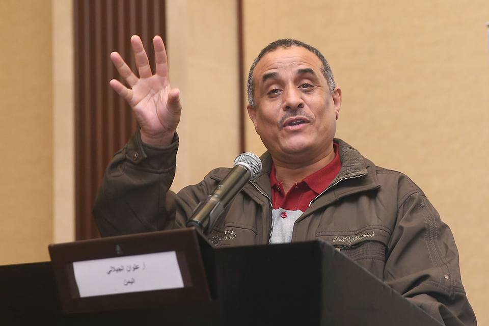 علوان مهدي الجيلاني